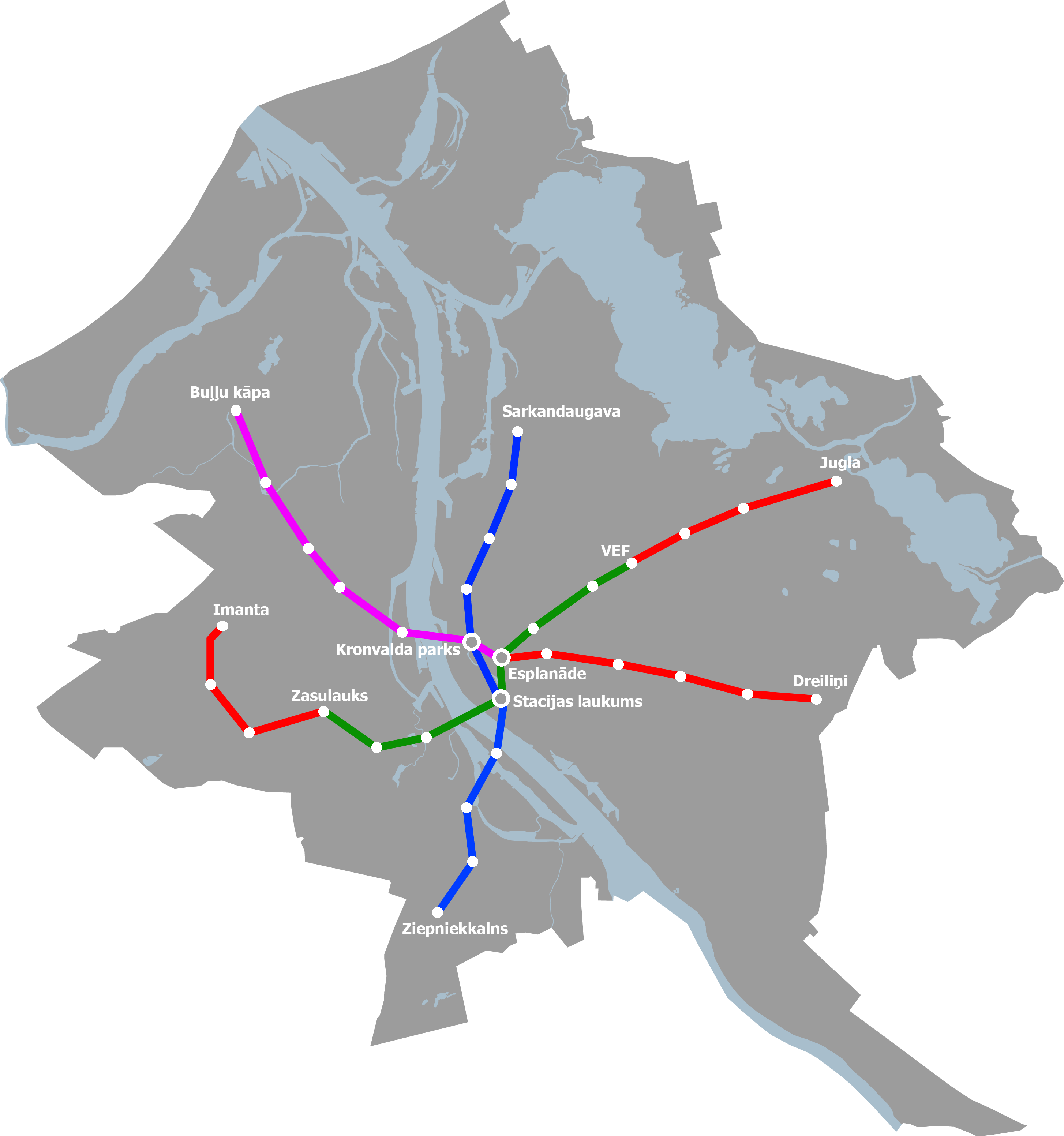 Схема Рижского метрополитена